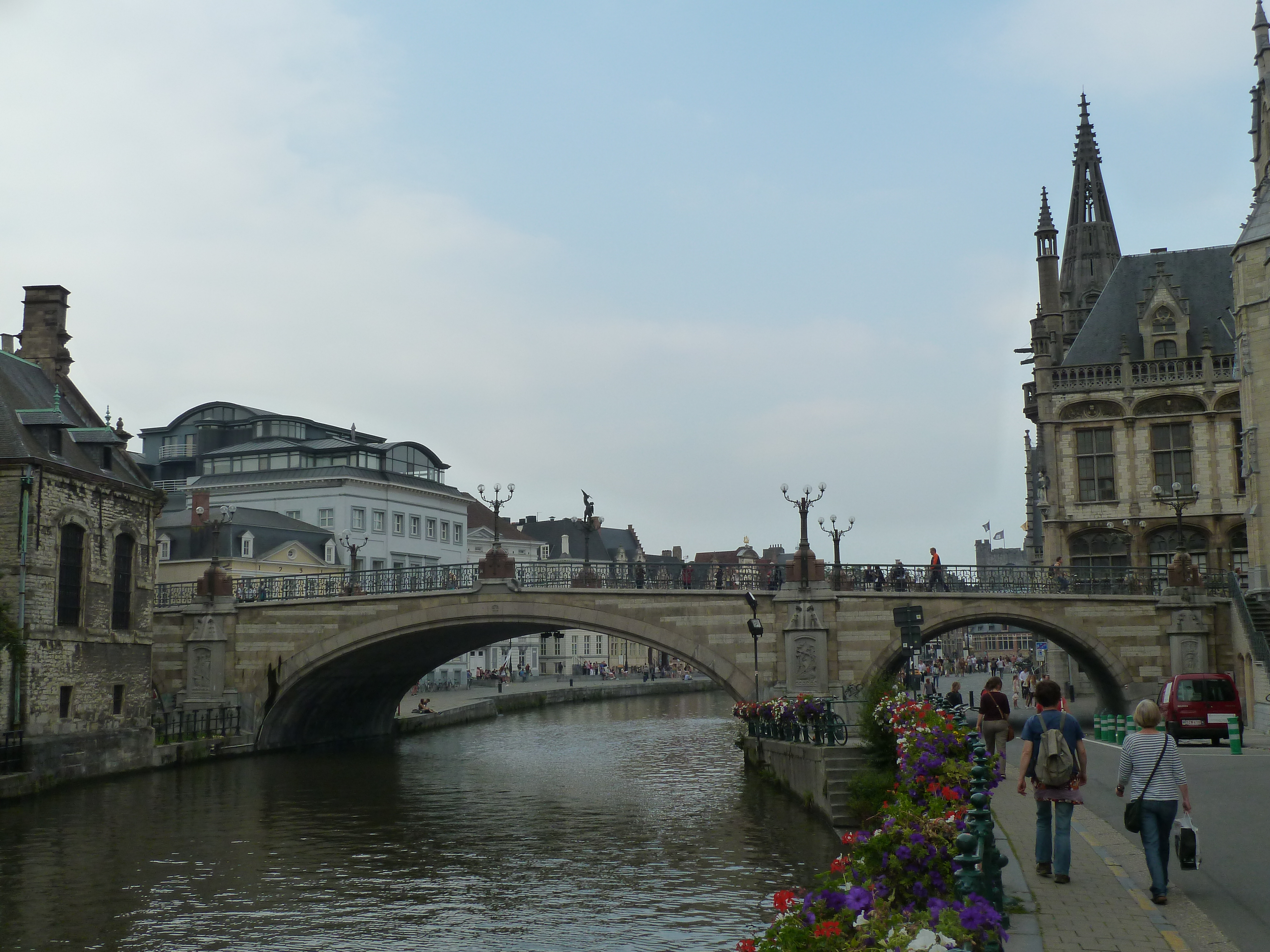 Sint-Michielsbrug, Gent, België